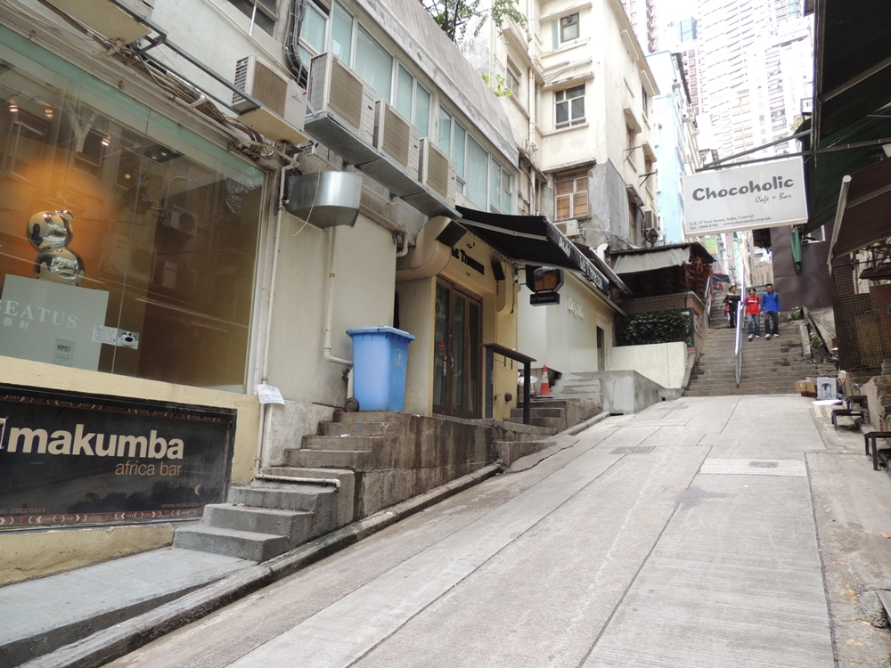 Peel Road, Soho, Hong Kong